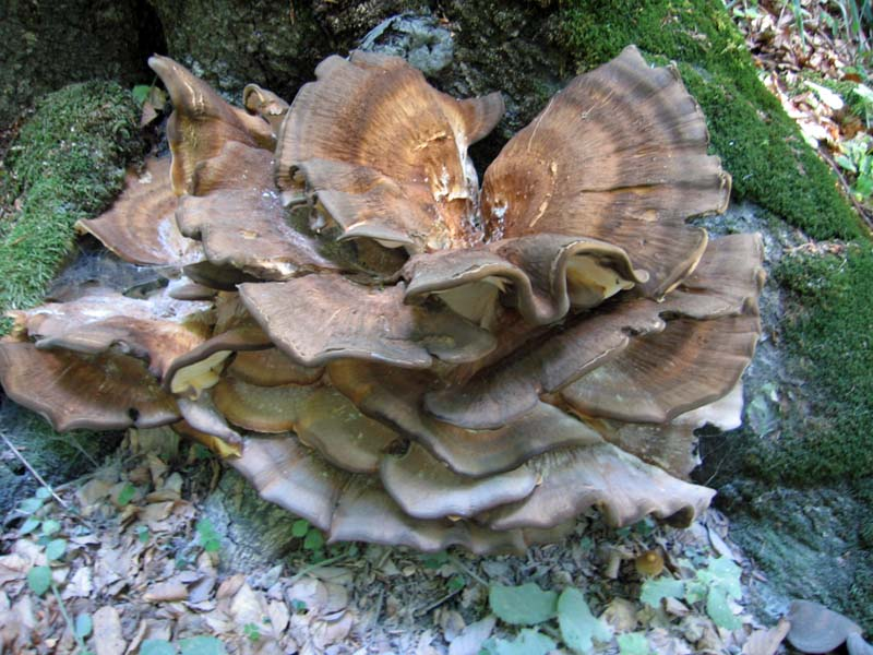 Gljiva iz Biogradske gore